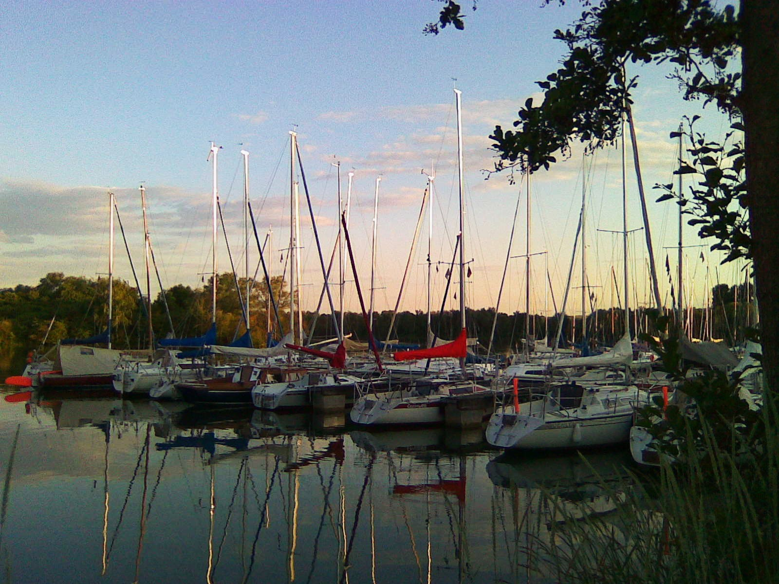 Ein Hafen an der Northeimer Seenplatte (Kiessee), an dem diverse Schiffe anliegen.